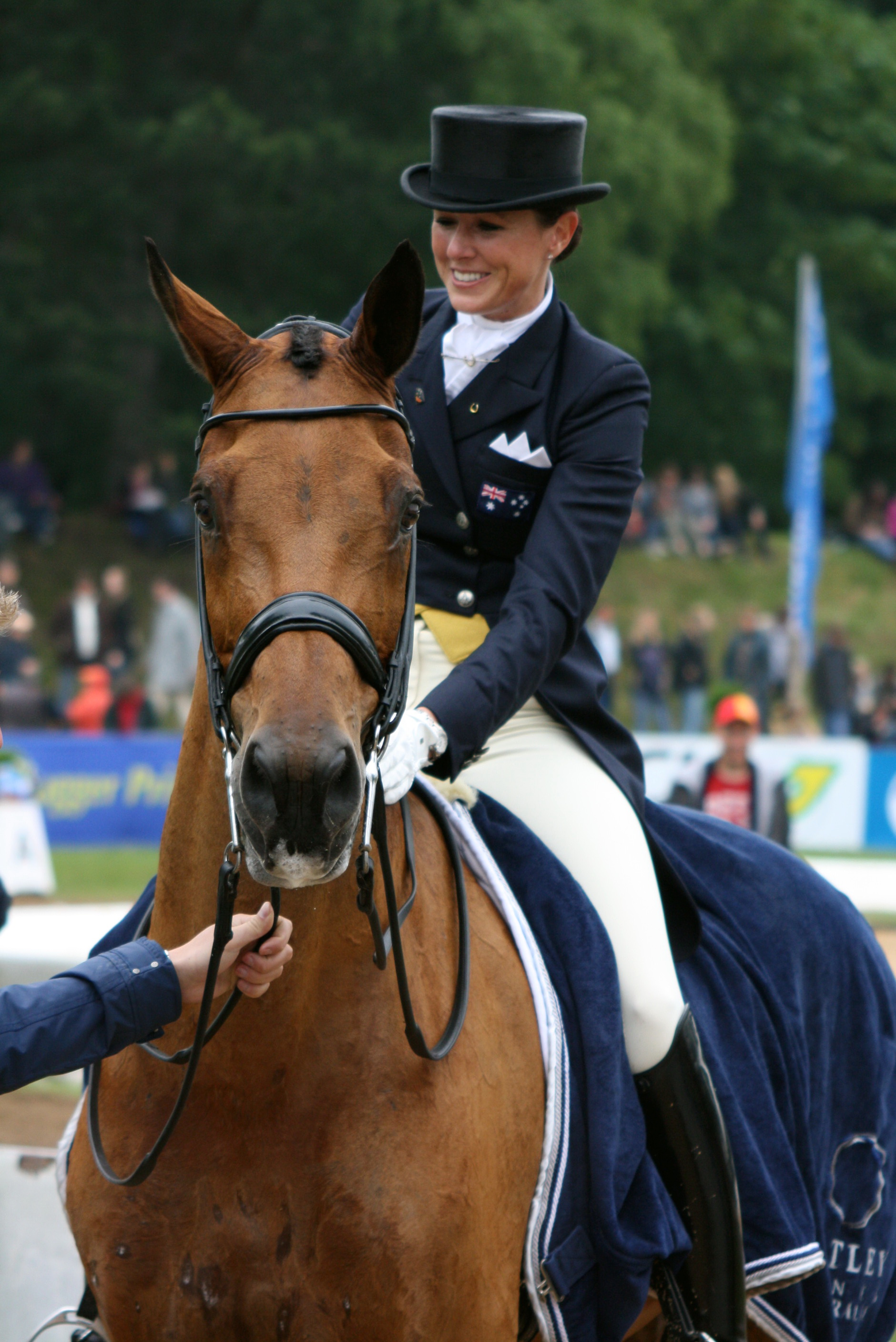 Dressurpferd auf der Pferd International 2011 (Lyndal Oatley mit Potifar)